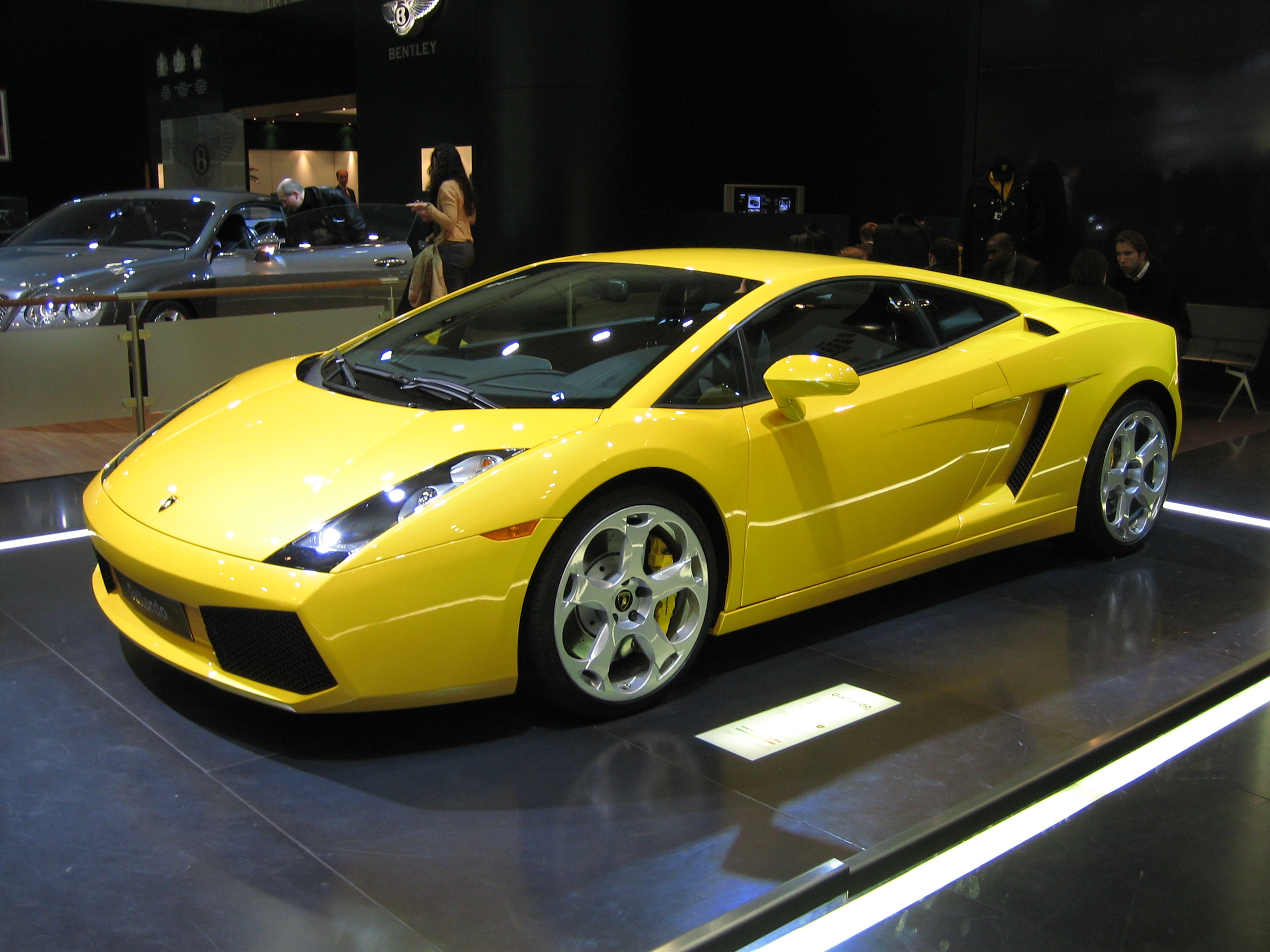 Lamborghini Gallardo (Brussel 2006)